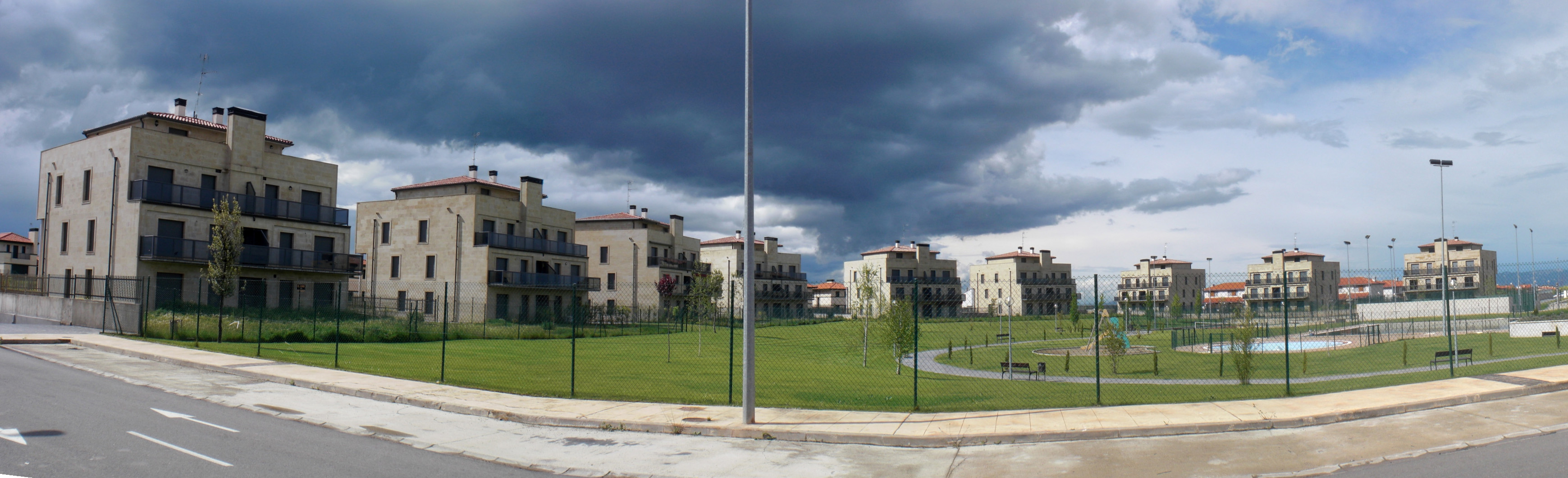 Errioxako Zirueña herriko urbanizazio berriaren erdigunea.